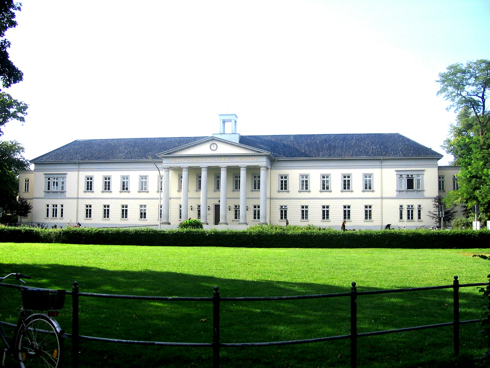 Peter Friedrich Ludwigs Hospital Oldenburg Eigenes Foto, selbst aufgenommen im September 2005, freigegeben vom Autor Gerold Meiners